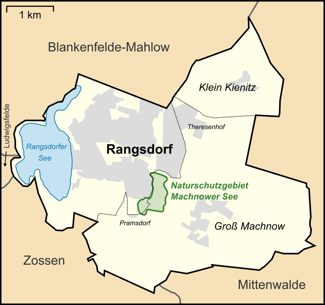 Karte des Naturschutzgebietes Machnower See